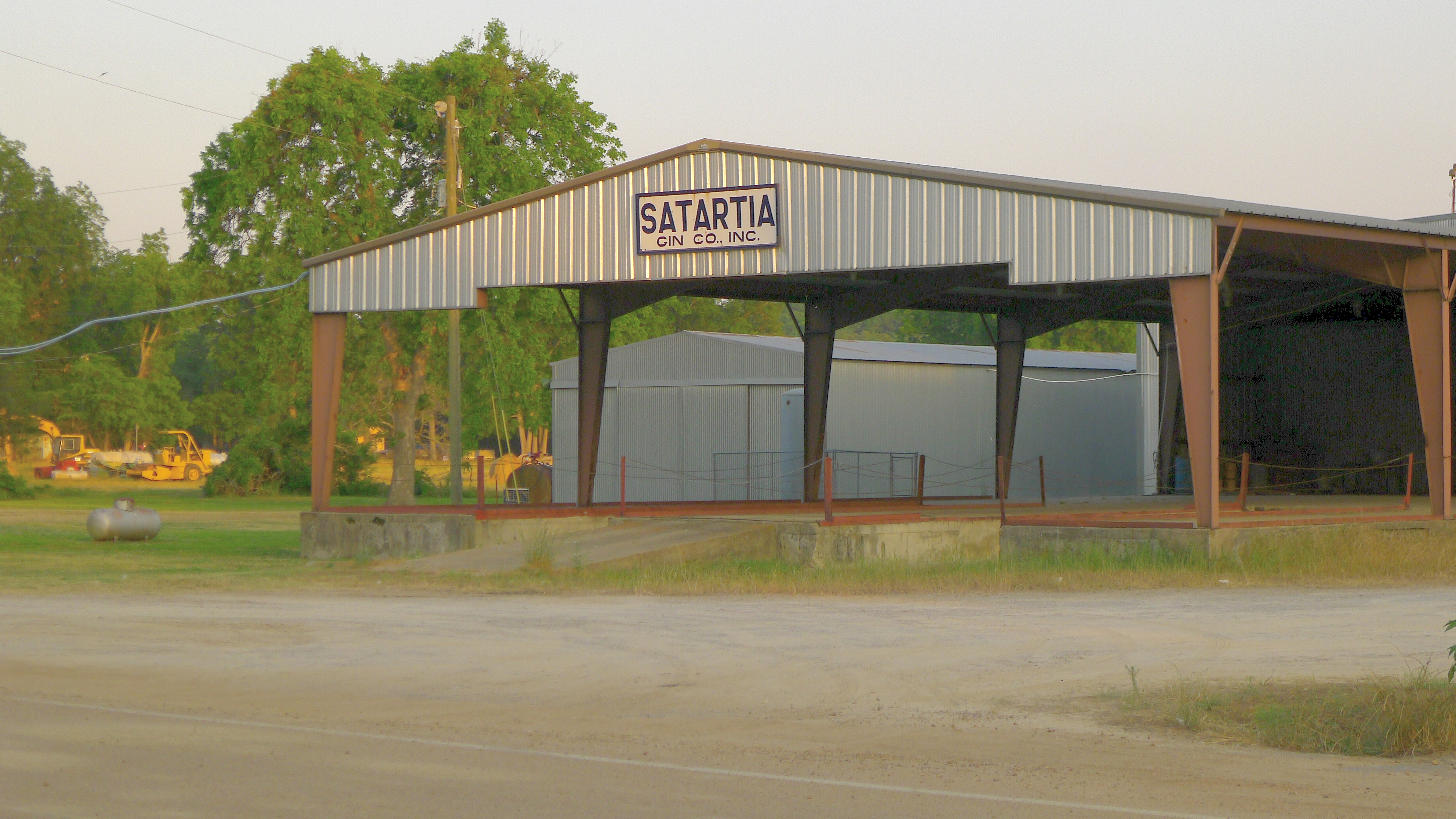 Satartia Gin